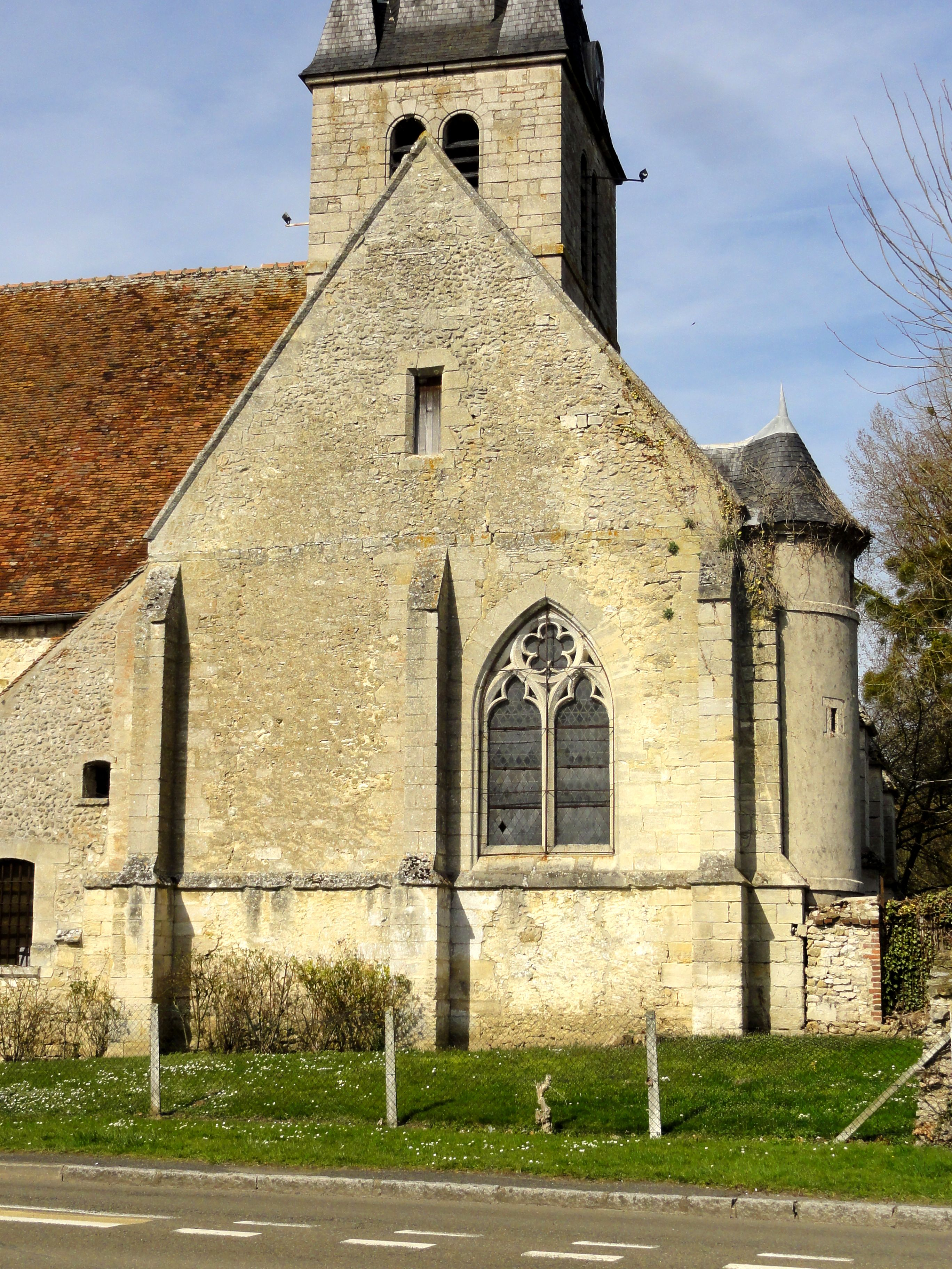 Le chœur-halle, côté sud.